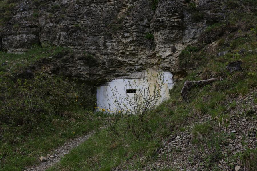 Stollen des Sonderbauvorhabens „S III“ im Jonastal (Thüringen), Stollen 14